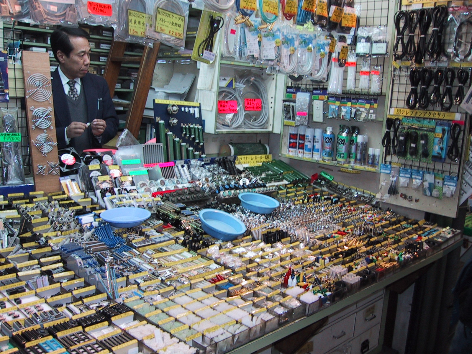 Dieser kleine Laden, der elektronische Bauteile verkauft, befindet sich in Akihabara in einer sehr engen Einkaufspassage.